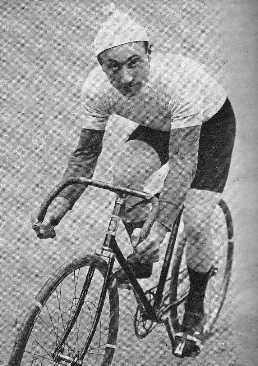 Cyrille Van Hauwaert, belgischer Radrennfahrer